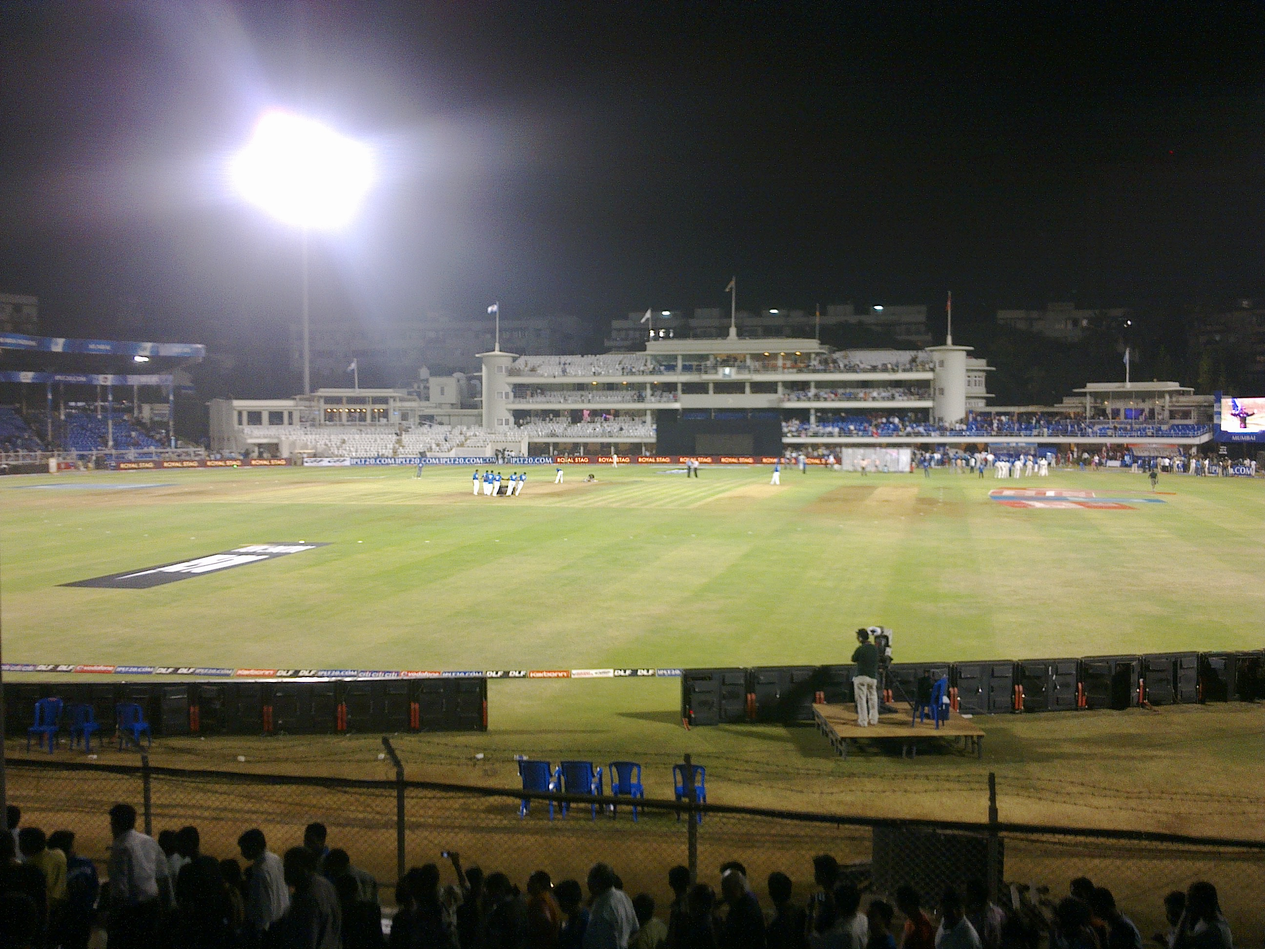 brabourne stadium IPL T20 match MI-Punjab